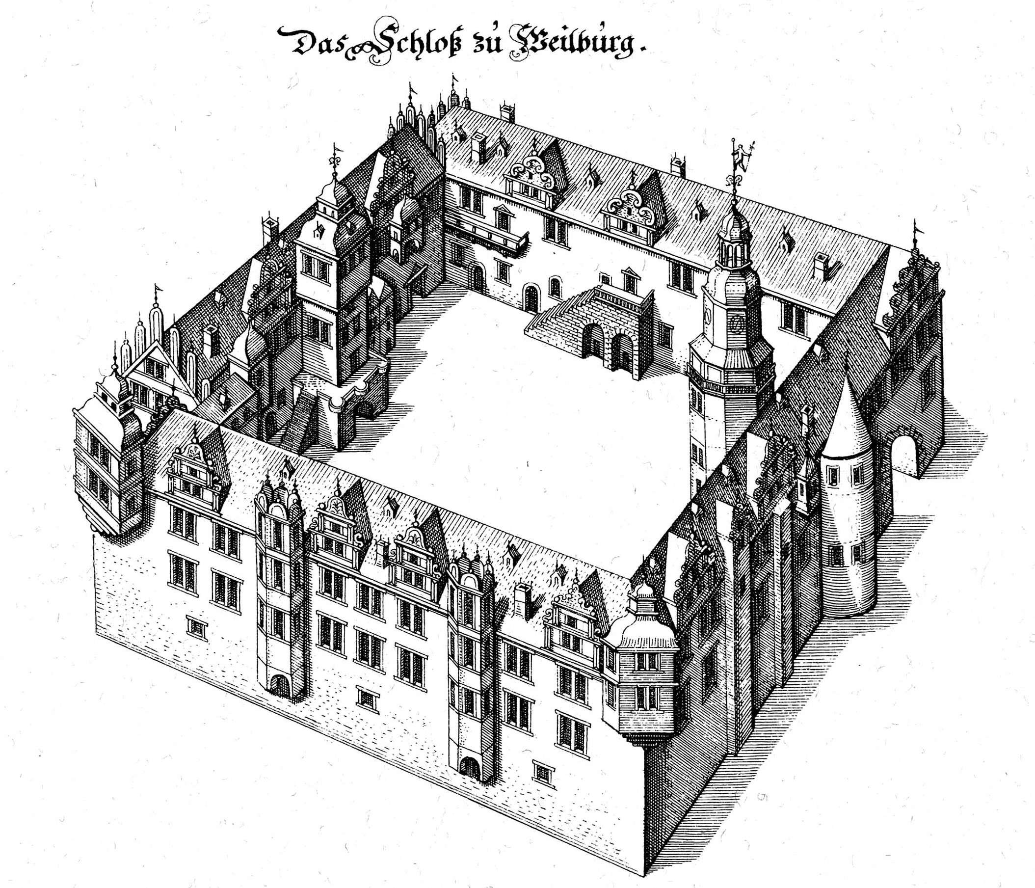 Dies ist Ausschnitt eines Scan des historischen Buches